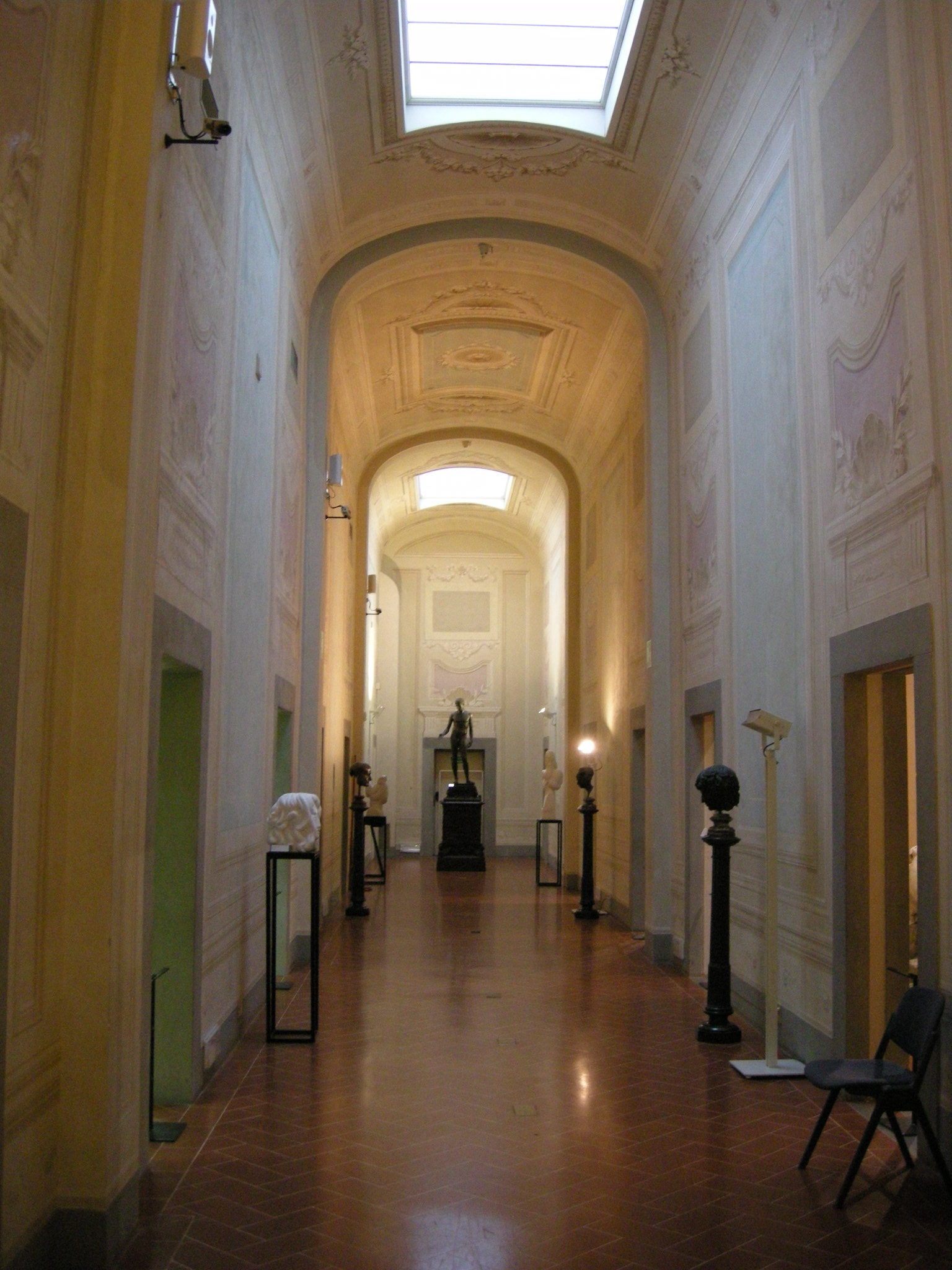 Galleria affrescata del Palazzo della Crocetta, in piazza Santissima Annunziata 1, che risale al 1620, e fu costruito da Giulio Parigi come residenza della principessa Maria Maddalena de' Medici. Oggi ospita il Museo archeologico nazionale di Firenze.